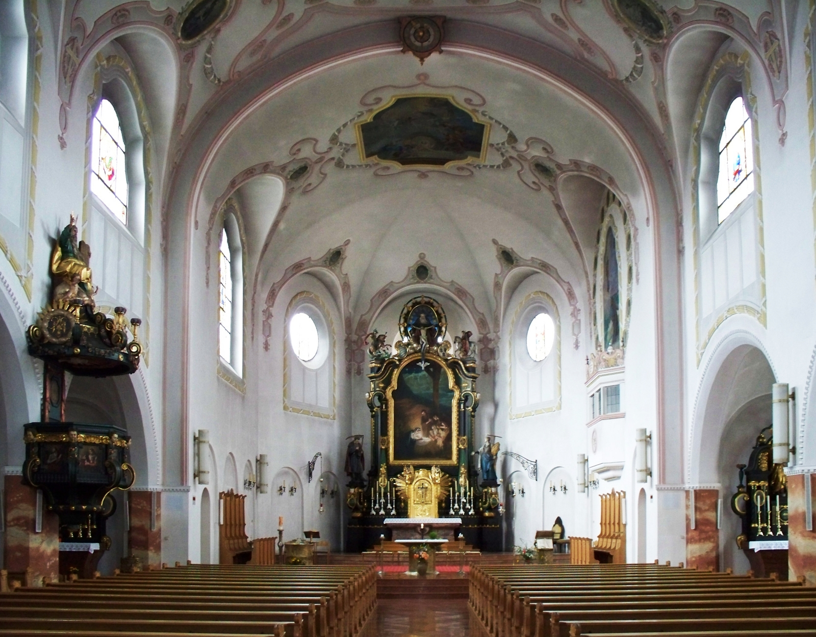 Im Inneren der Stadtpfarrkirche Heilige Familie in Bad Griesbach.